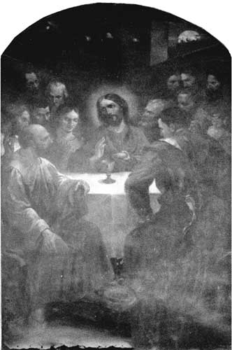 Апошняя Вячэра. Другая палова XVIІI ст., в. Крамяніца, Зэльвенскі р-н